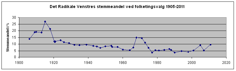 Bemærk at ved folketingsvalget i 1915 blev der i langt de fleste valgkredse afholdt fredsvalg. Derfor er stemmetallene ikke opgjort, men opgørelsen af stemmeandelen er i stedet baseret på mandatandelen: 31 af 114 mandater.